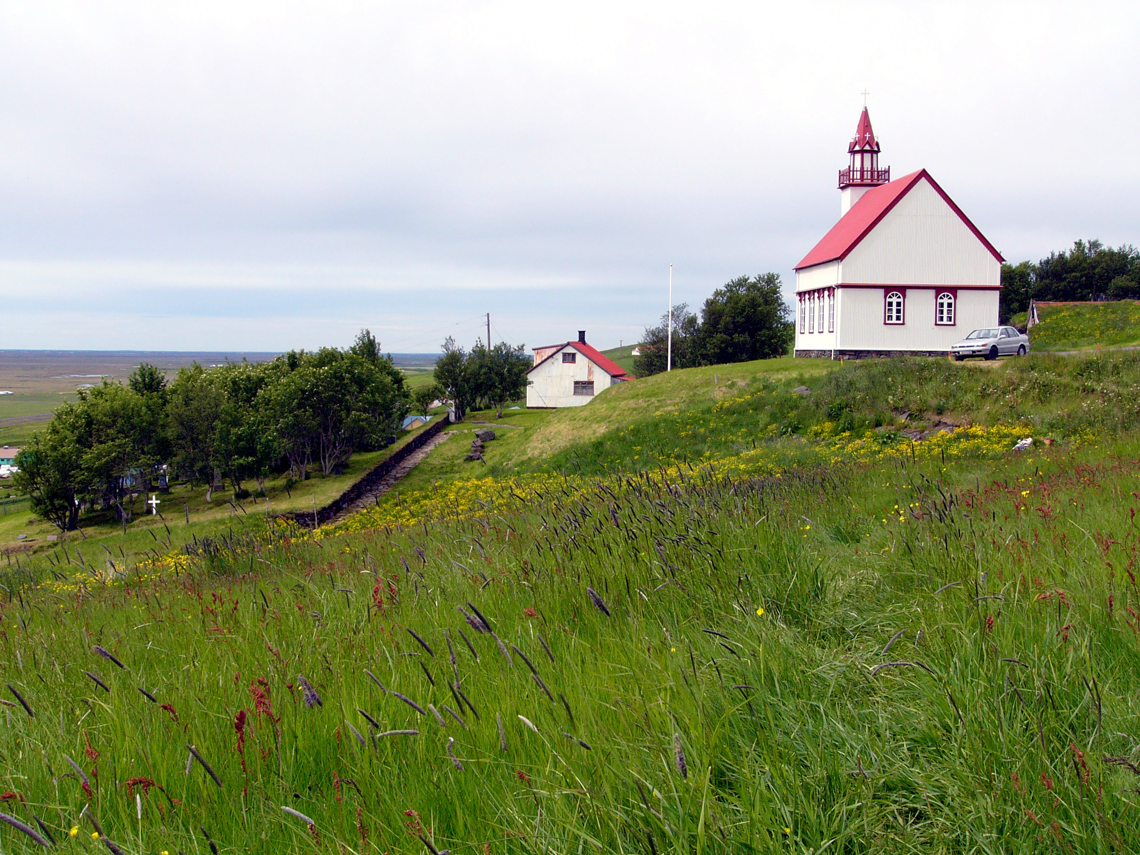 Church in Hlíðarendi.